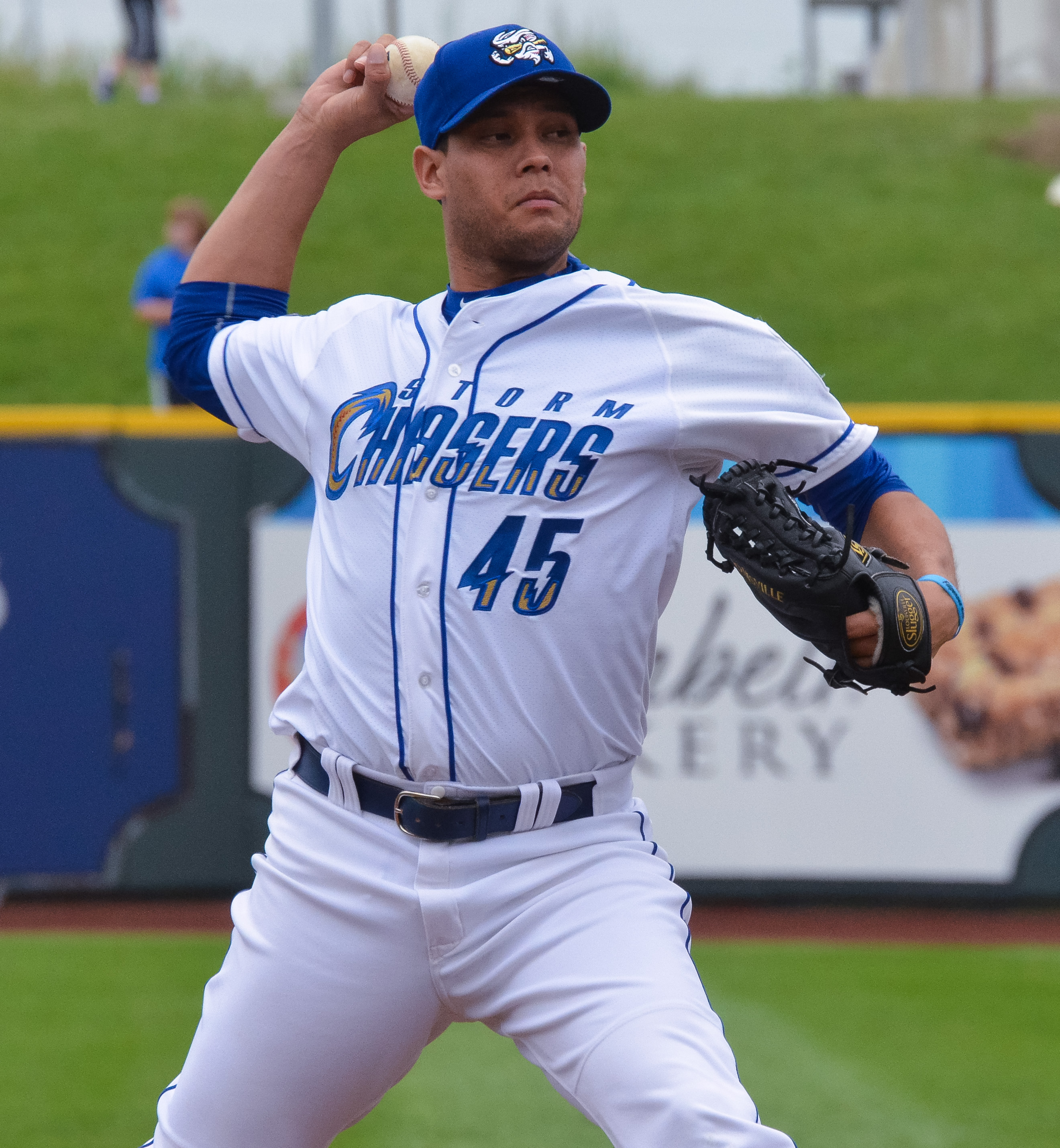 Yohan Pino